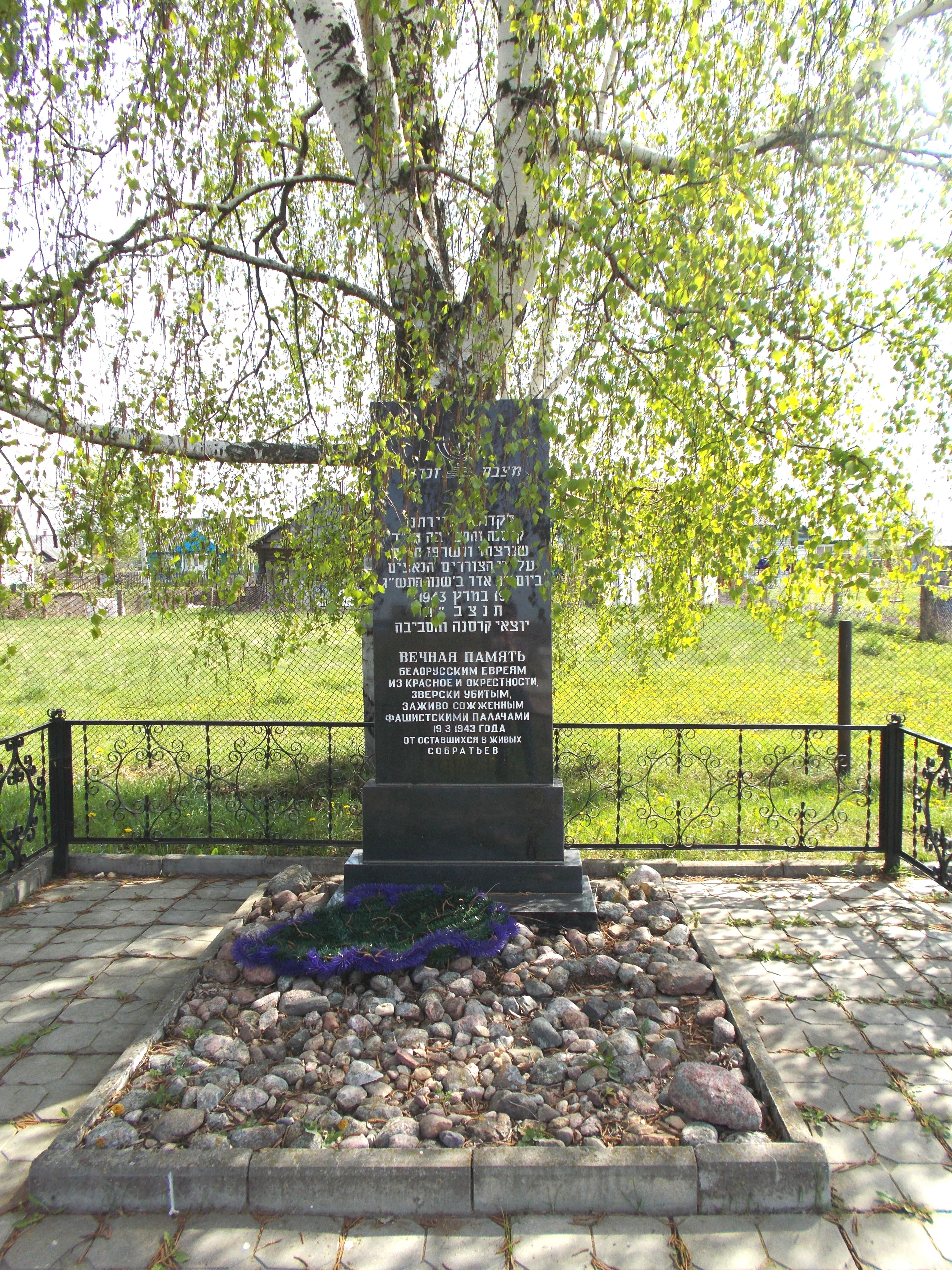 Памятник на братской могиле евреев деревни Красное Молодечненского района, убитых нацистами 19 марта 1943 года. Находится около улицы Набережная возле дома № 16.